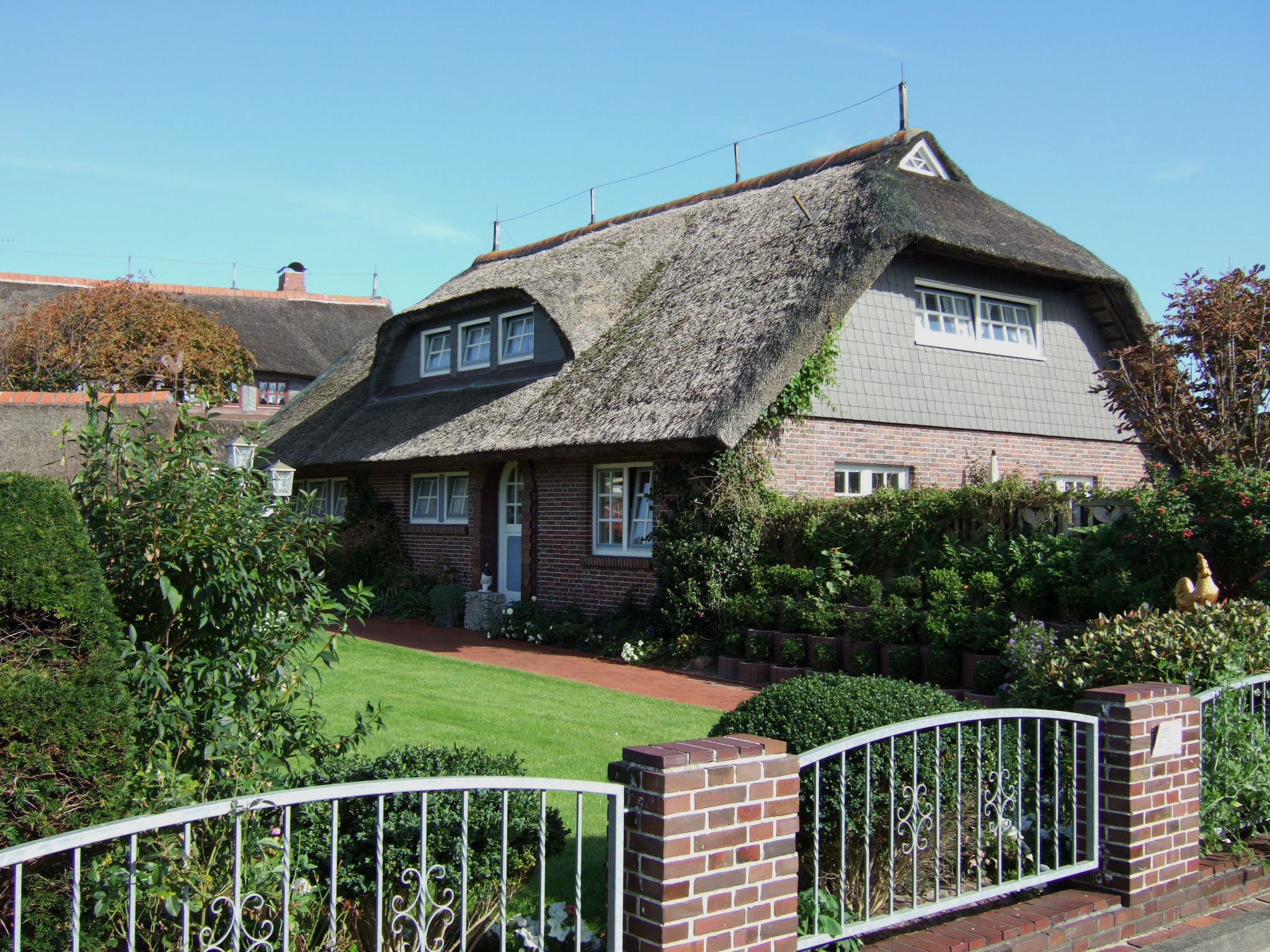 Sommerhaus von Lale Andersen auf der Nordseeinsel Langeoog.